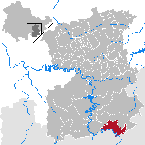 Hirschberg in Thuringia - Saale-Orla-Kreis